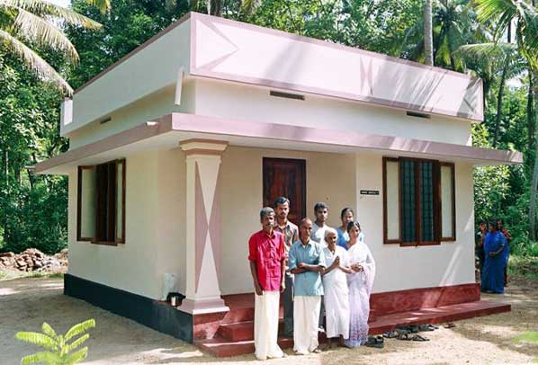 "Von Dach überm Kopf gebautes Haus" zur Verfügung gestellt von Dach überm Kopf auf